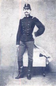 Blaha János (Jan Blaha) cseh származású osztrák katona. Színházi-, és katonakarmester. Blaha Lujza első férje.